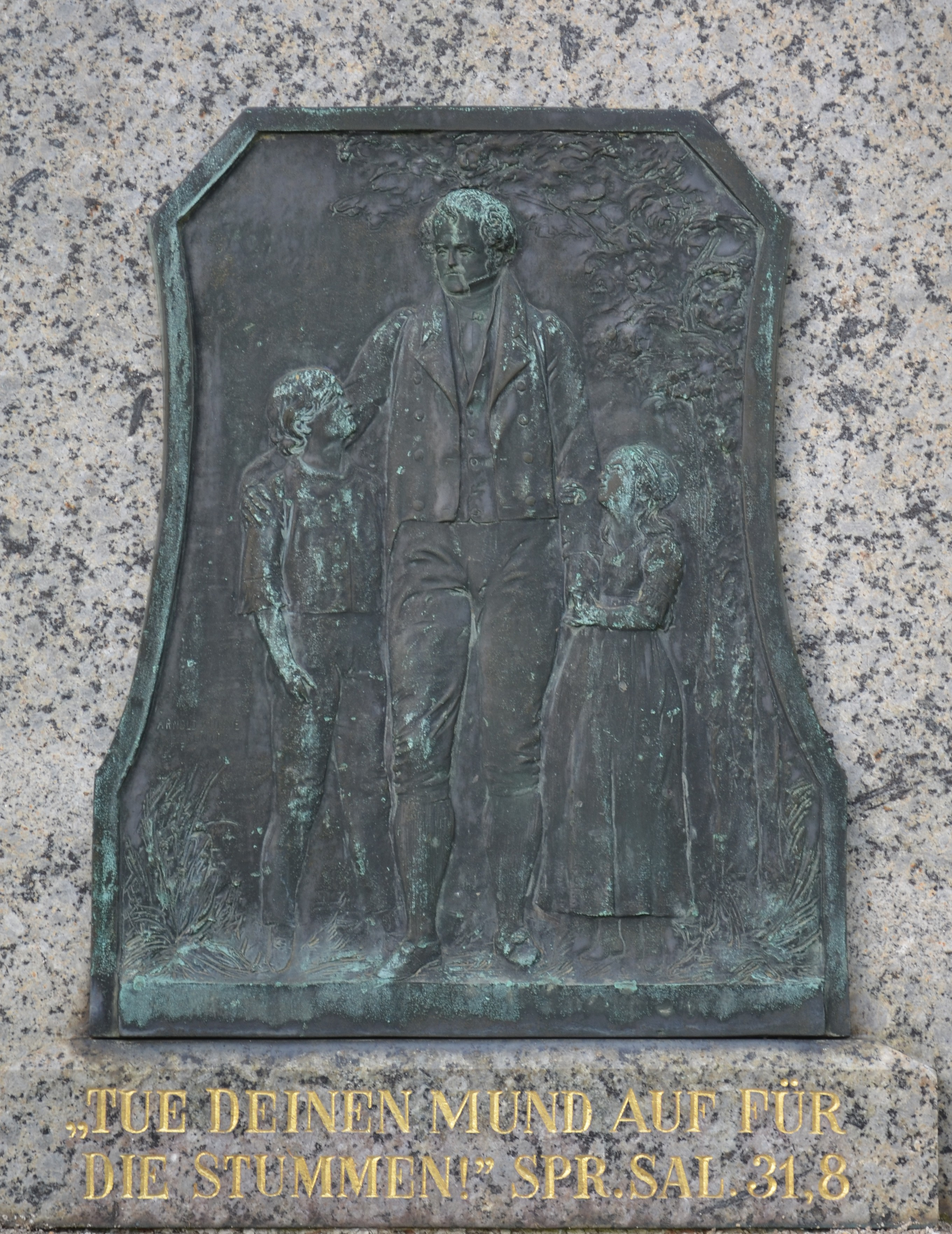 Bad Camberg, Freiherr von Schütz-Schule, Denkmal, Tafel